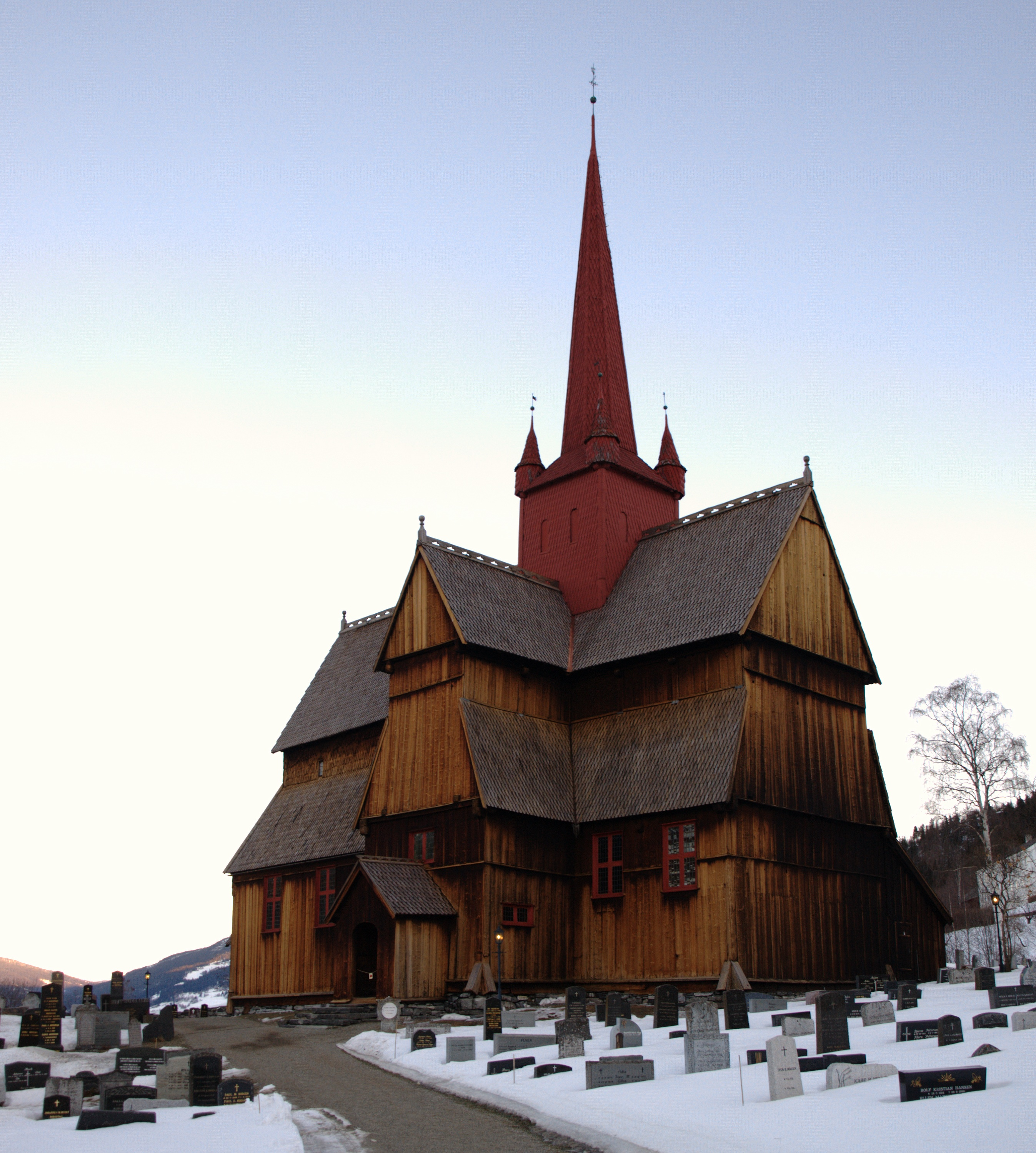 Ringebu stavkirke i Ringebu kommune.